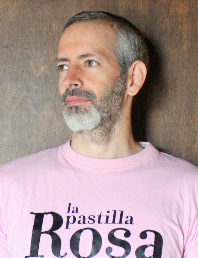 Fotografía del escritor Rafael R. Valcárcel